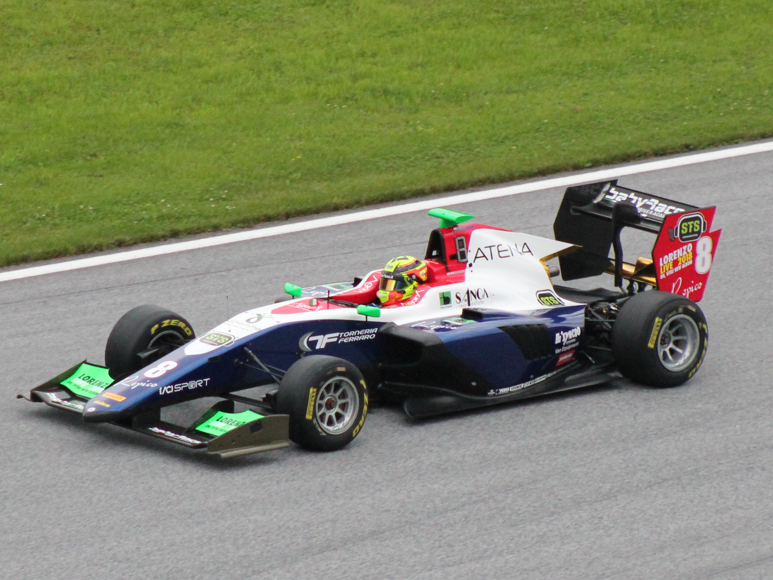 08 Alessio Lorandi beim Rennwochenende in Österreich 2018